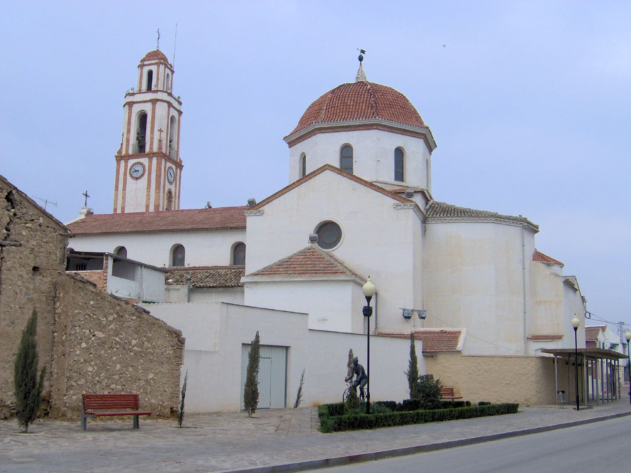 Iglesia de Ceutí, municipio de Murcia, España.